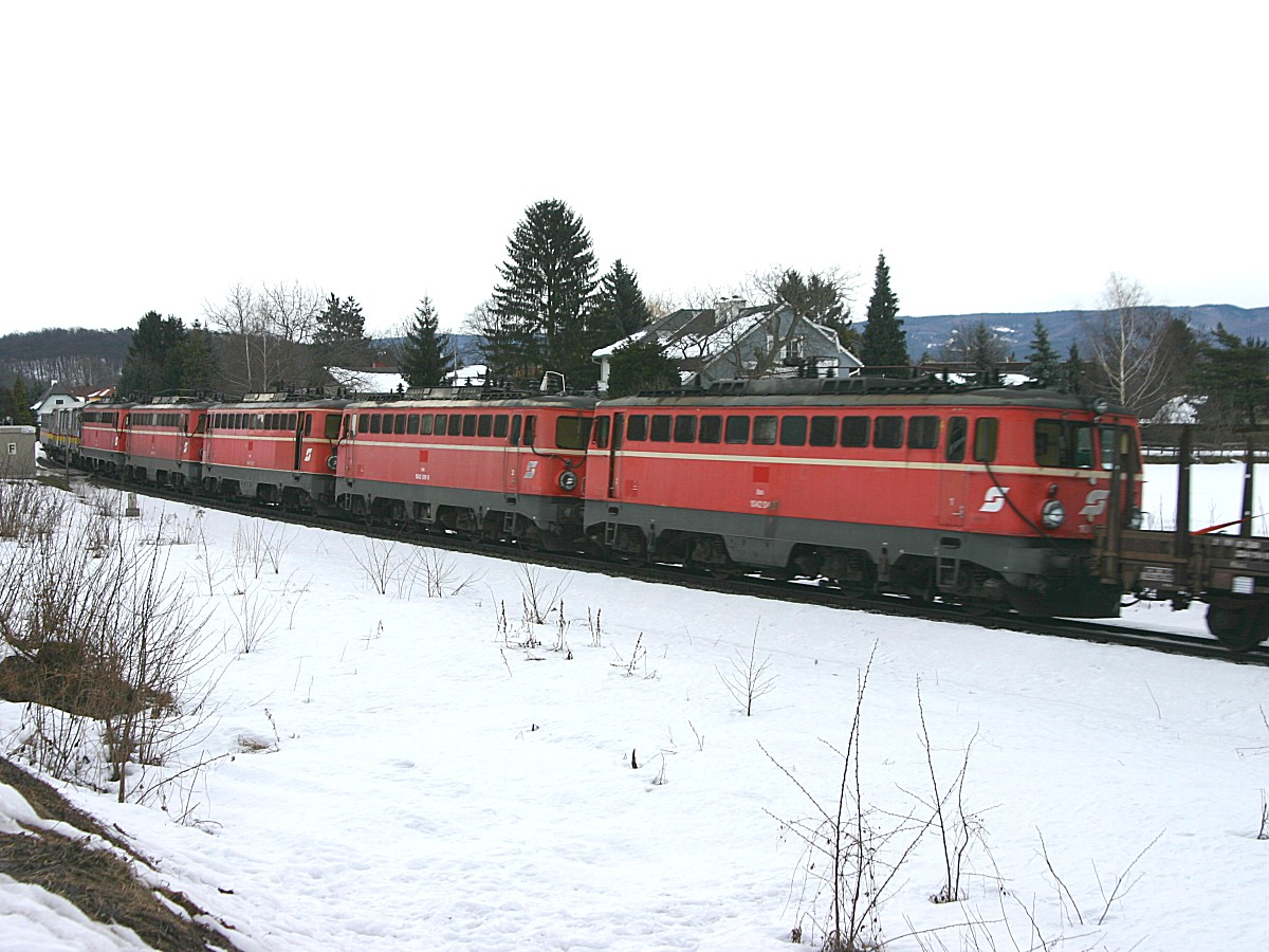 5 x ÖBB 1042 am Weg zur Verschrottung nach Fürstenfeld.jpg